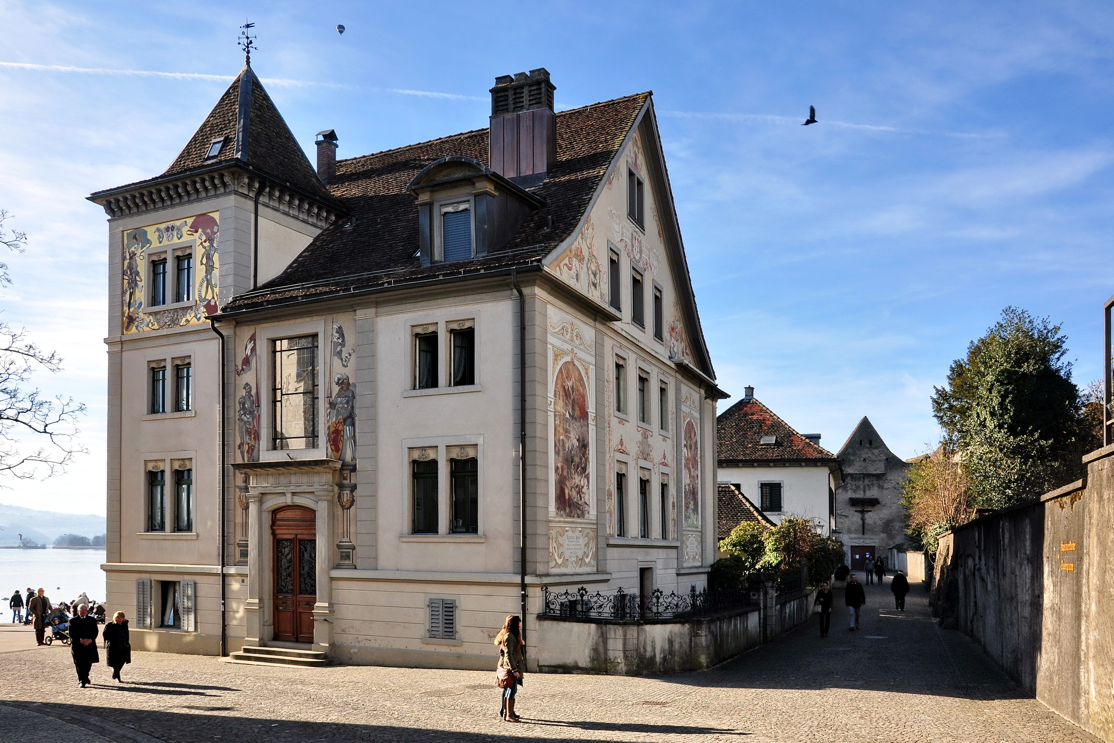 Haus Curtiplatz 1 in Rapperswil (Switzerland)